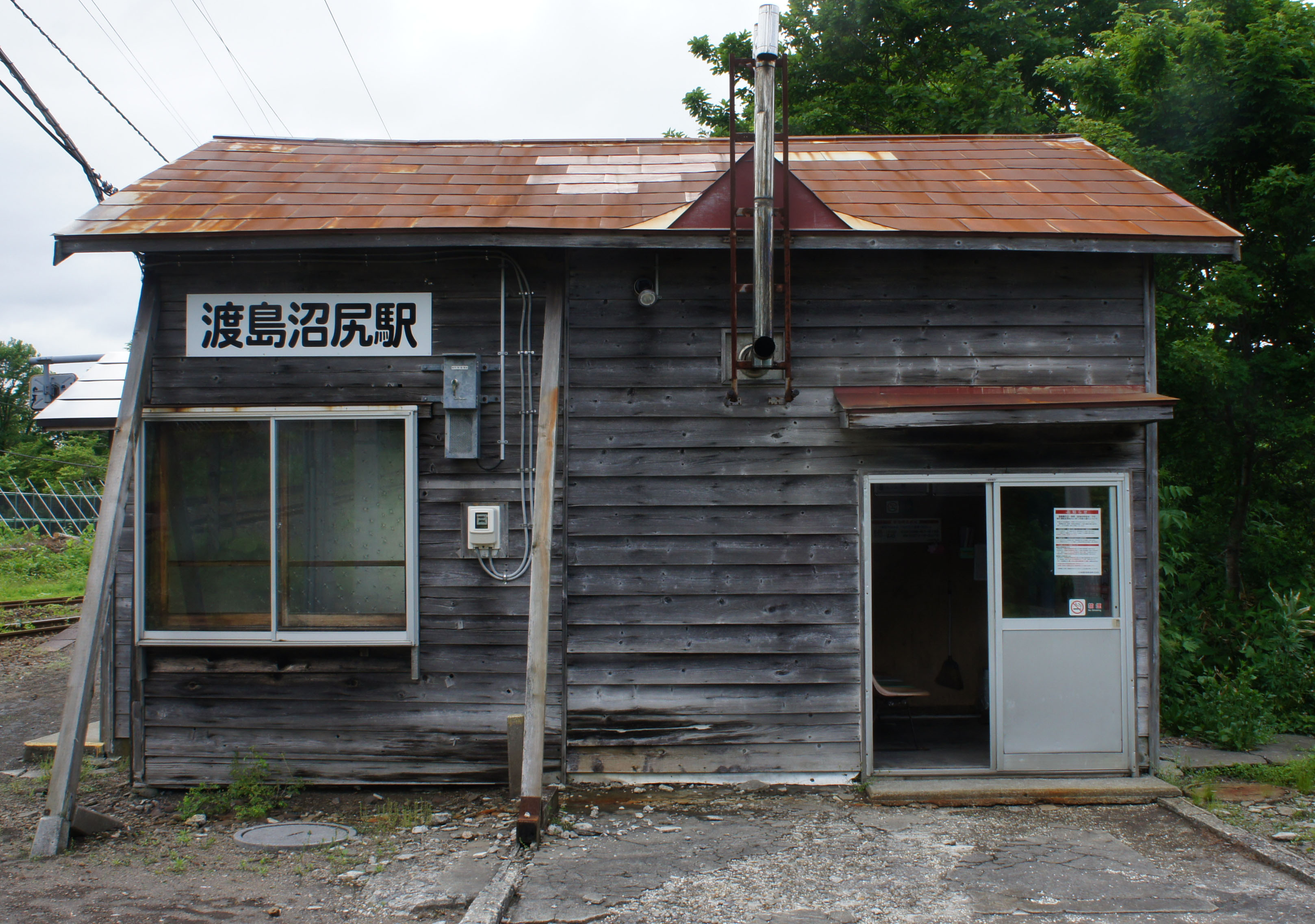 JR函館本線・渡島沼尻駅の駅舎